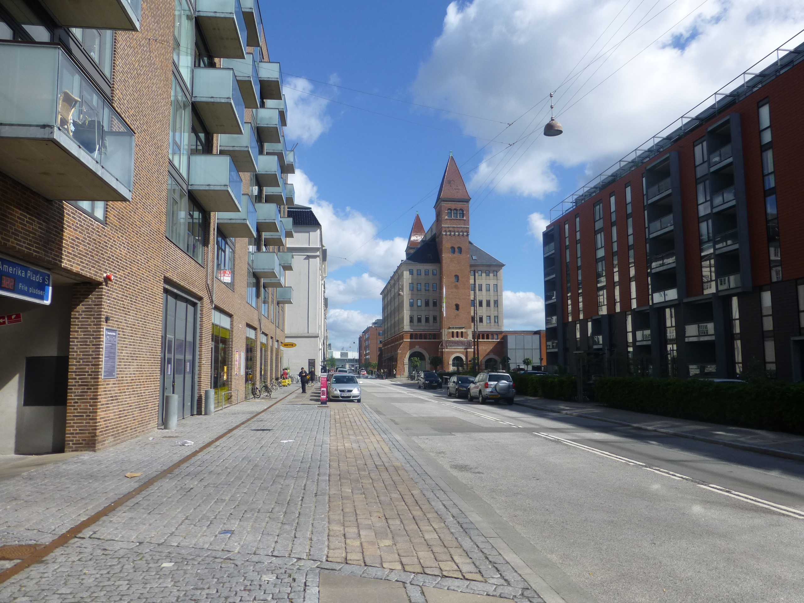 The street Dampfærgevej in Østerbro in Copenhagen.